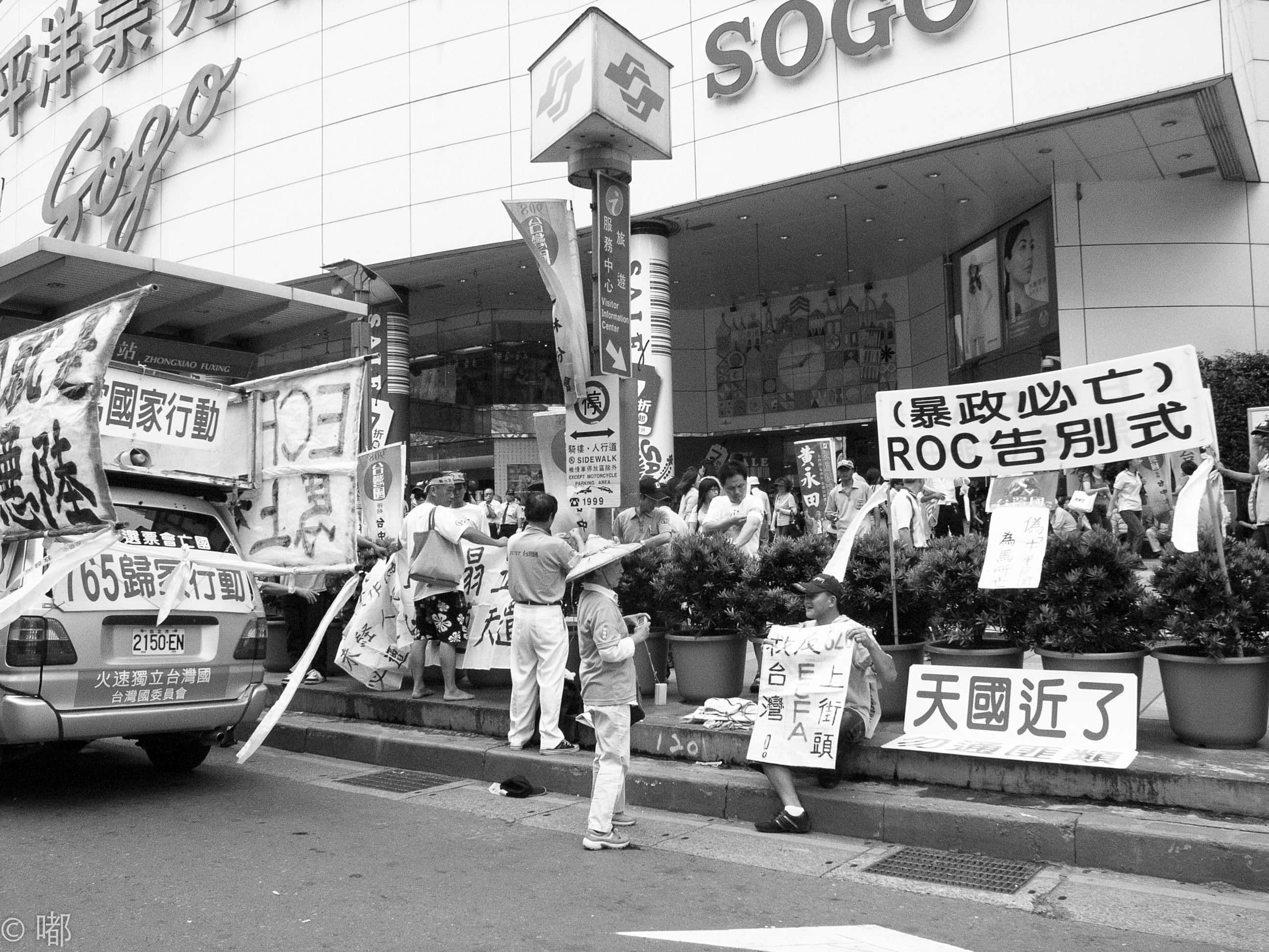 June 26 2010 Anti-ECFA protest